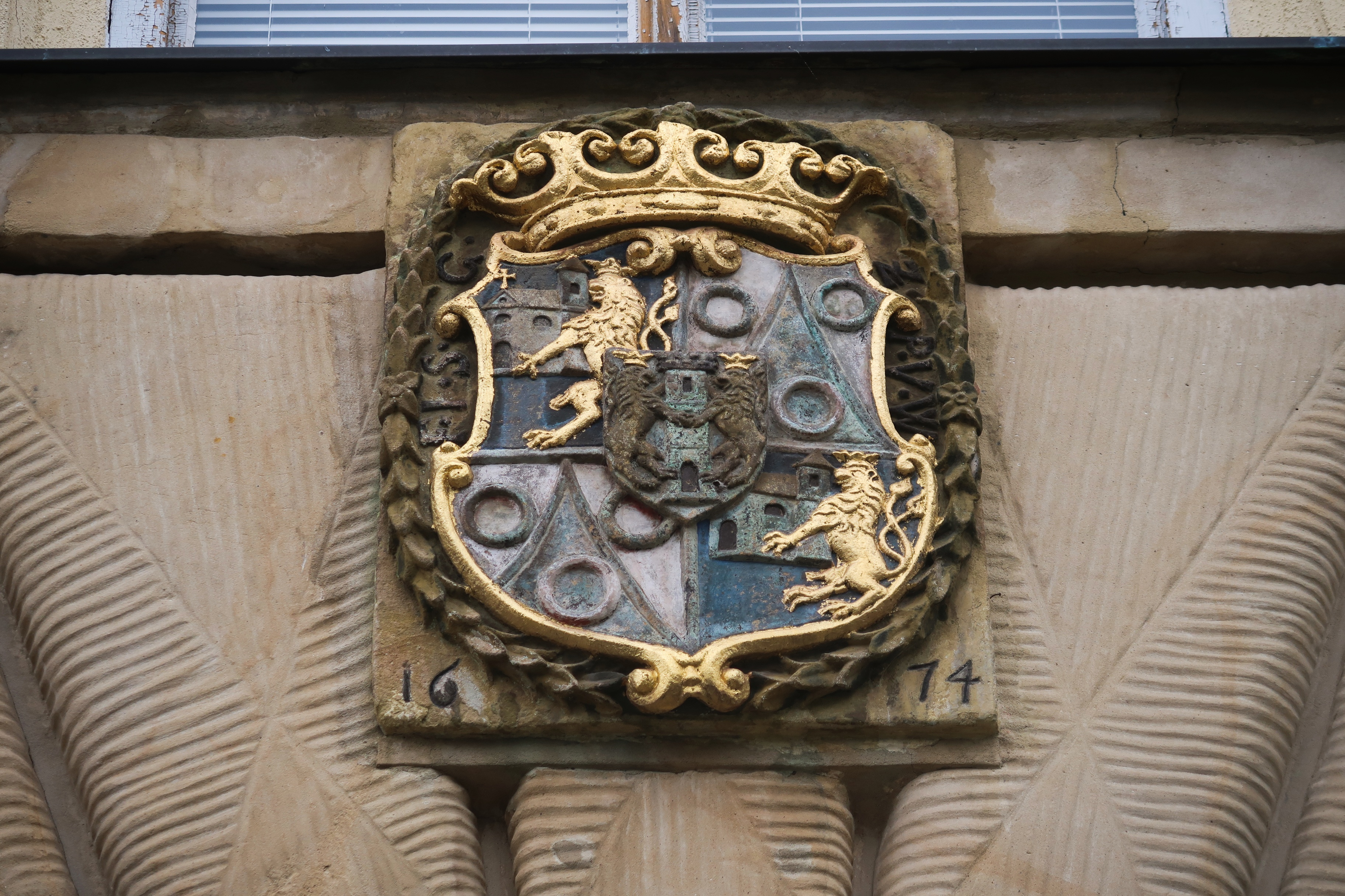 Erb Šliků nad hlavním vchodem do zámku